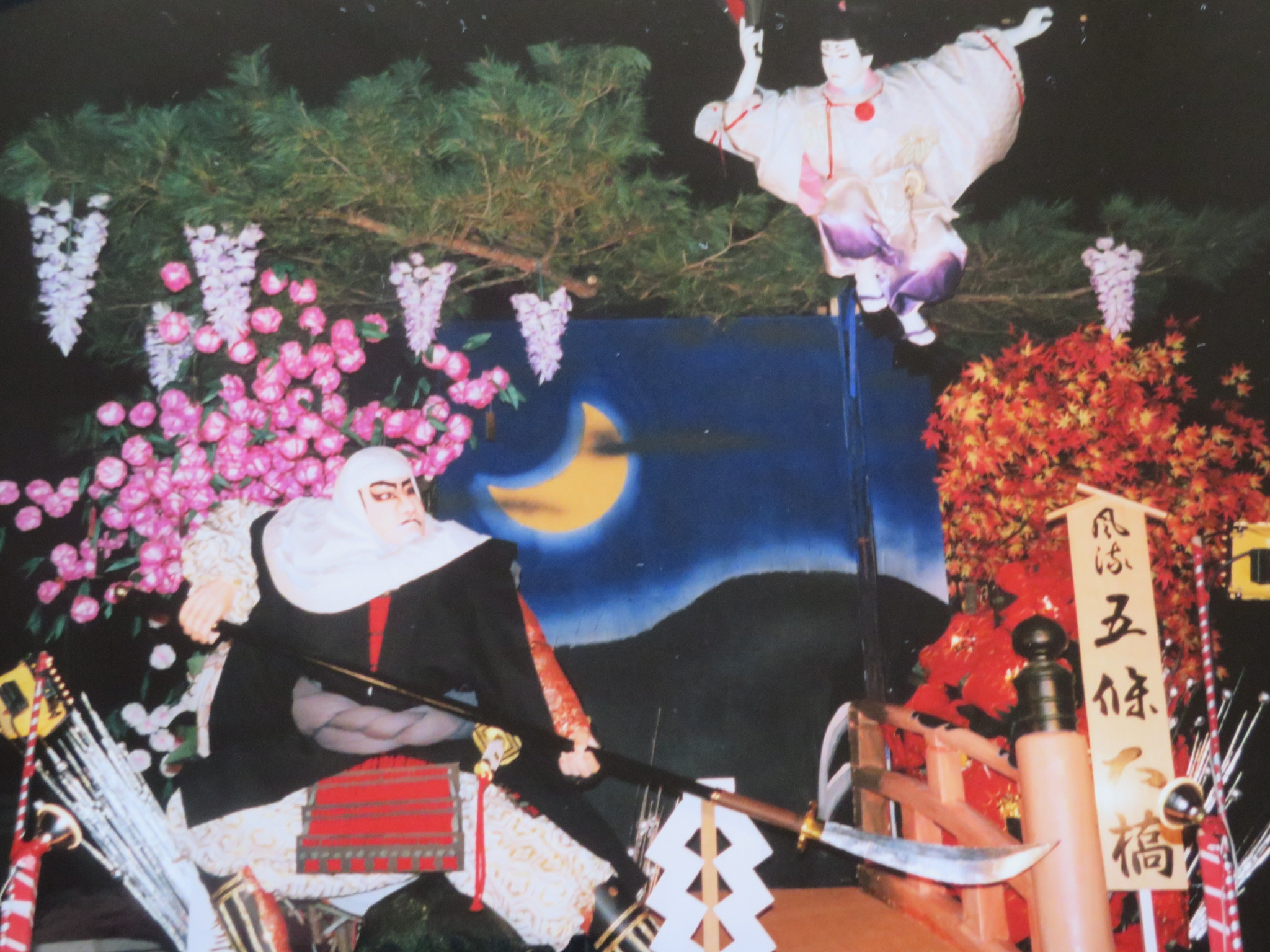 山車・五条大橋。